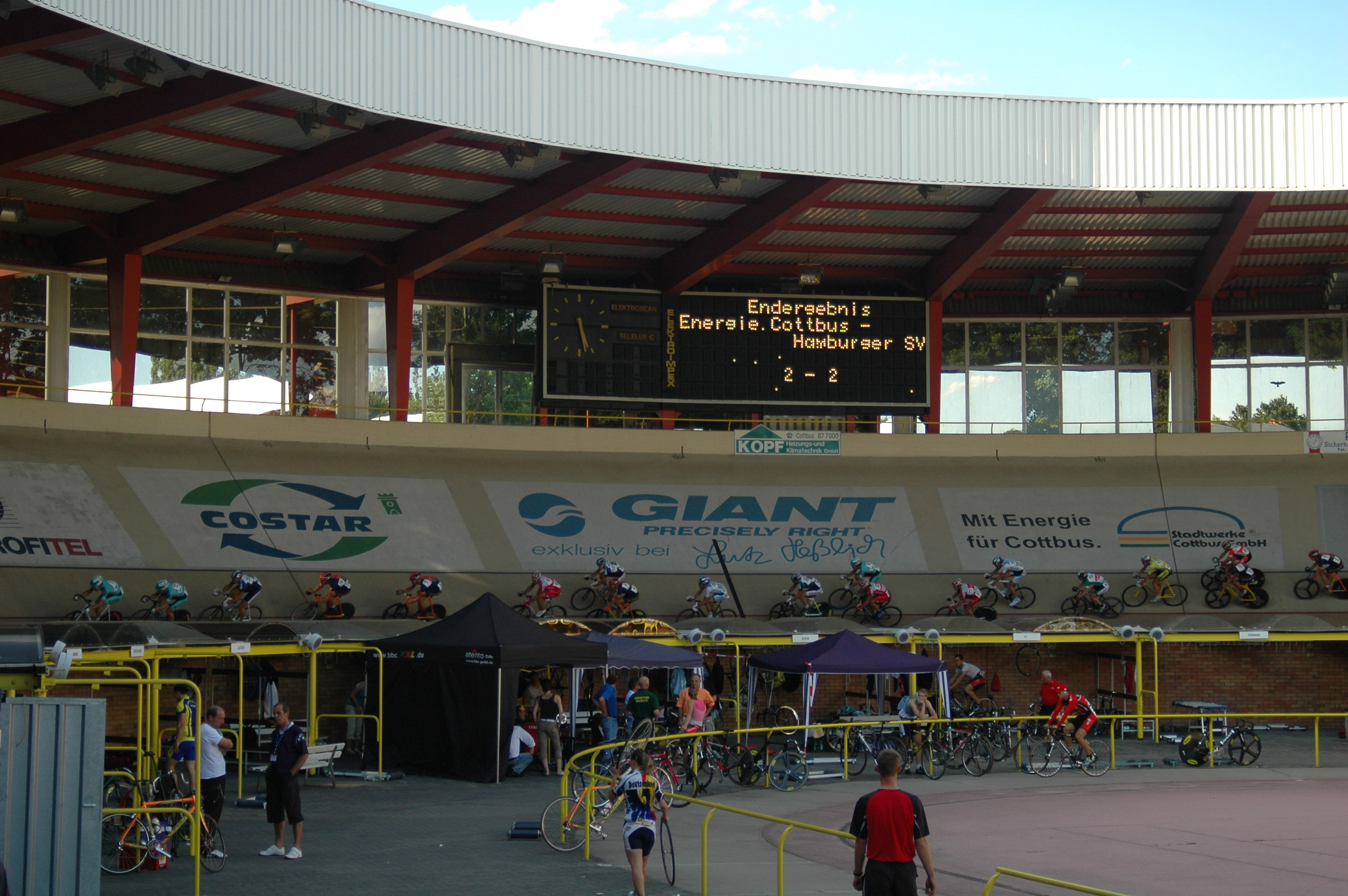 Innenraum Radstadion Cottbus mit Fußballergebnis